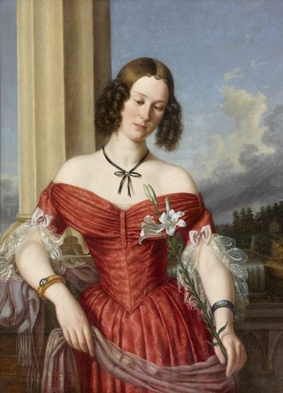 Мария (Маргарита) Александровна Волконская, ур. Бенкендорф (1820—1880)